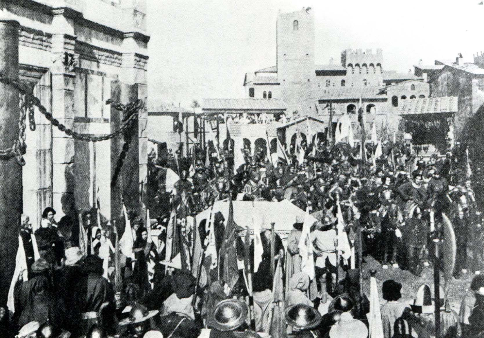 Una scena del film Dante nella vita e nei tempi suoi - regia Domenico Gaido 1922 - produz. Montalbano - V.I.S. Firezne